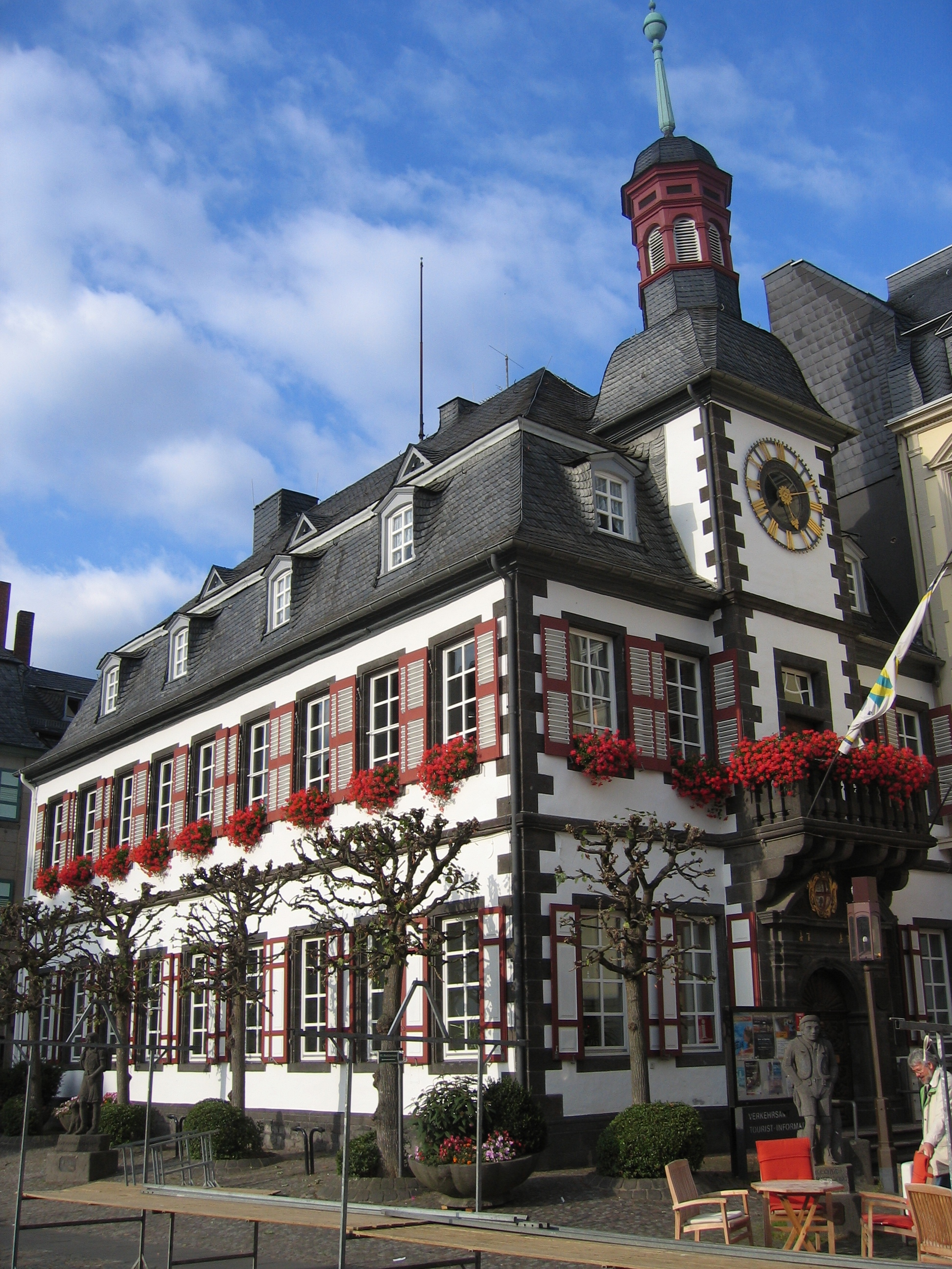 Das Alte Rathaus in Mayen